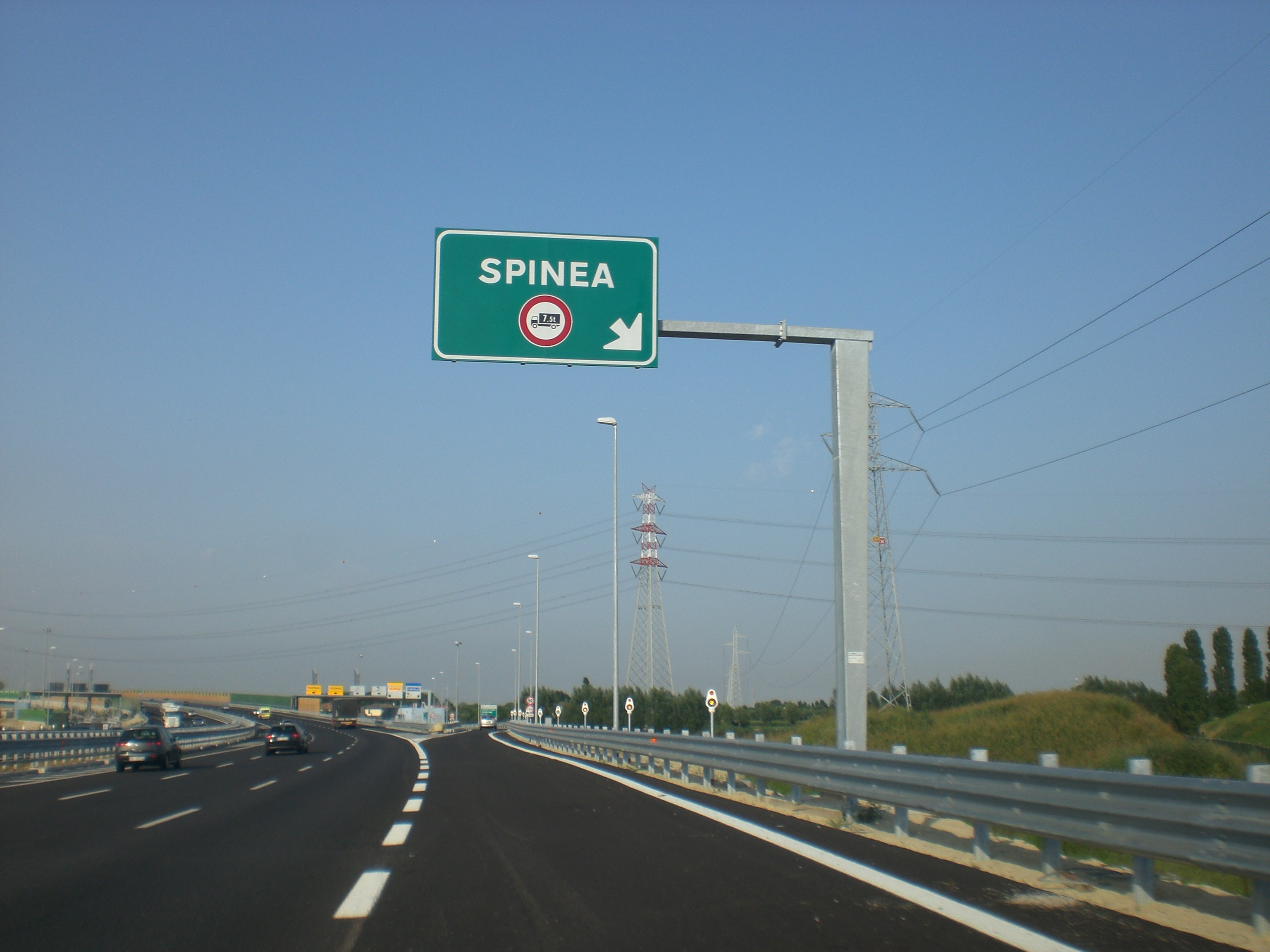 Svincolo Spinea nell'A4